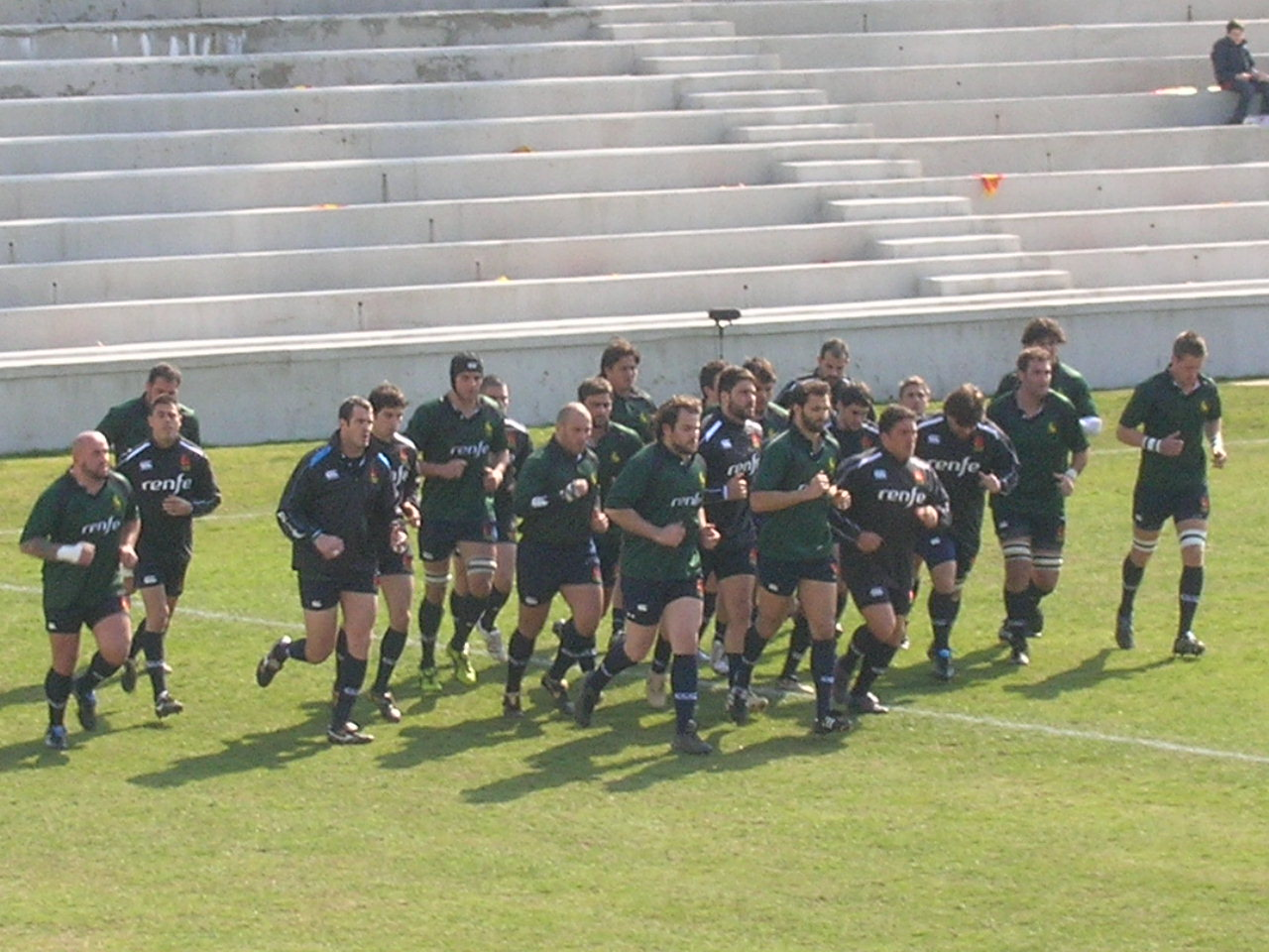 jugadores calentando antes de un partido